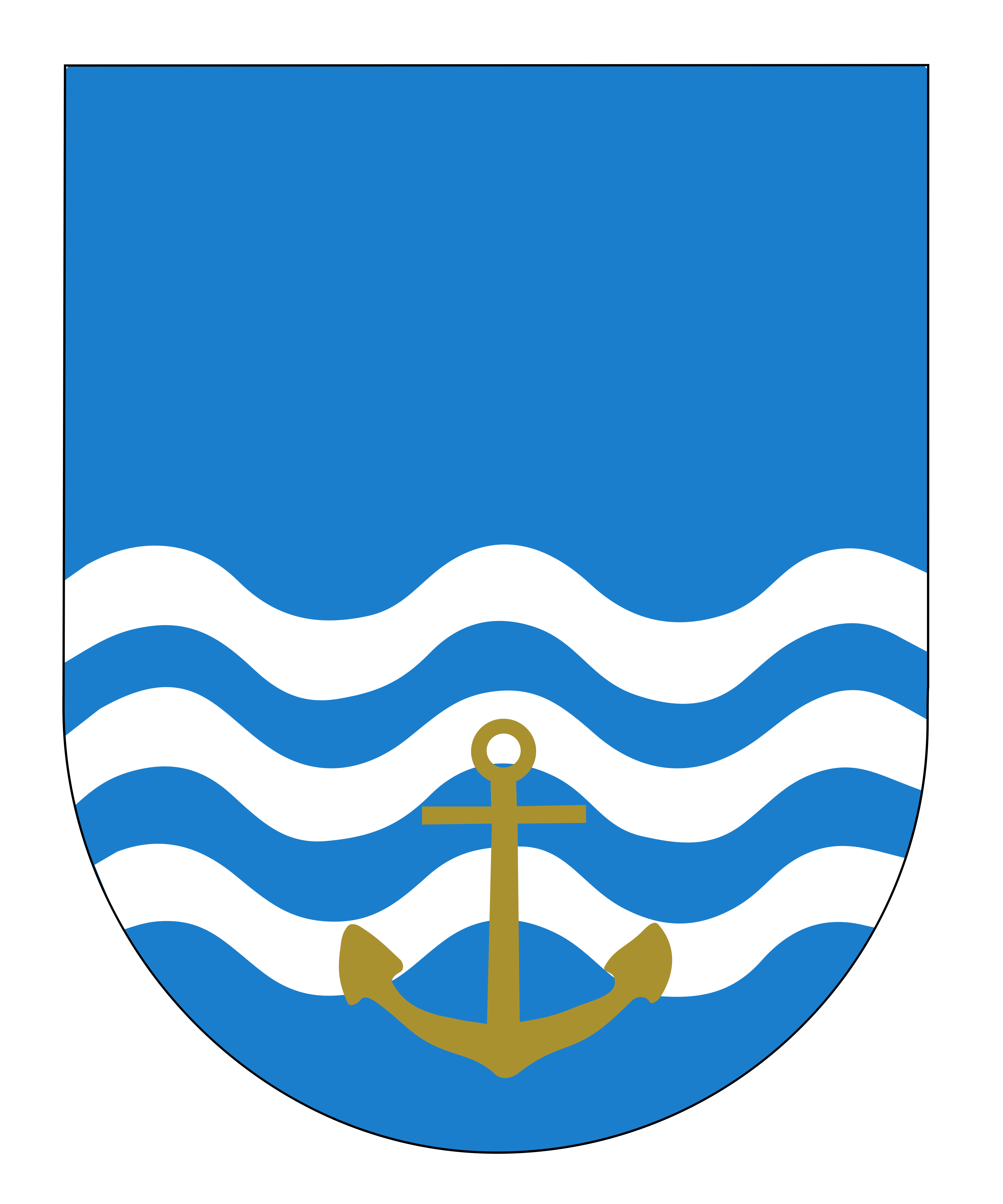 Gamleby sockenvapen tolkat efter dess blasonering.